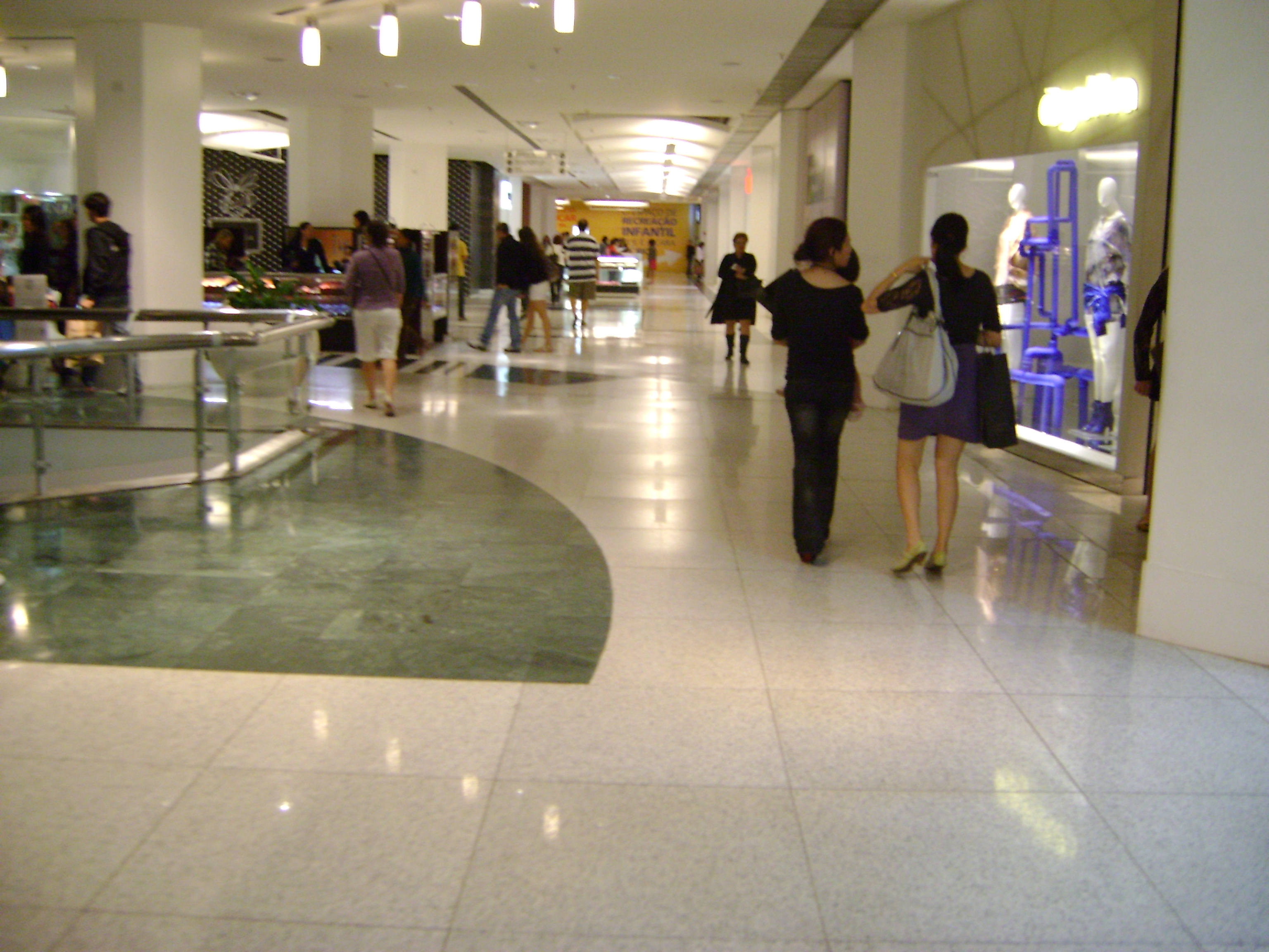 Interior do Rio Sul Shopping, Botafogo, Rio de Janeiro, Brasil.